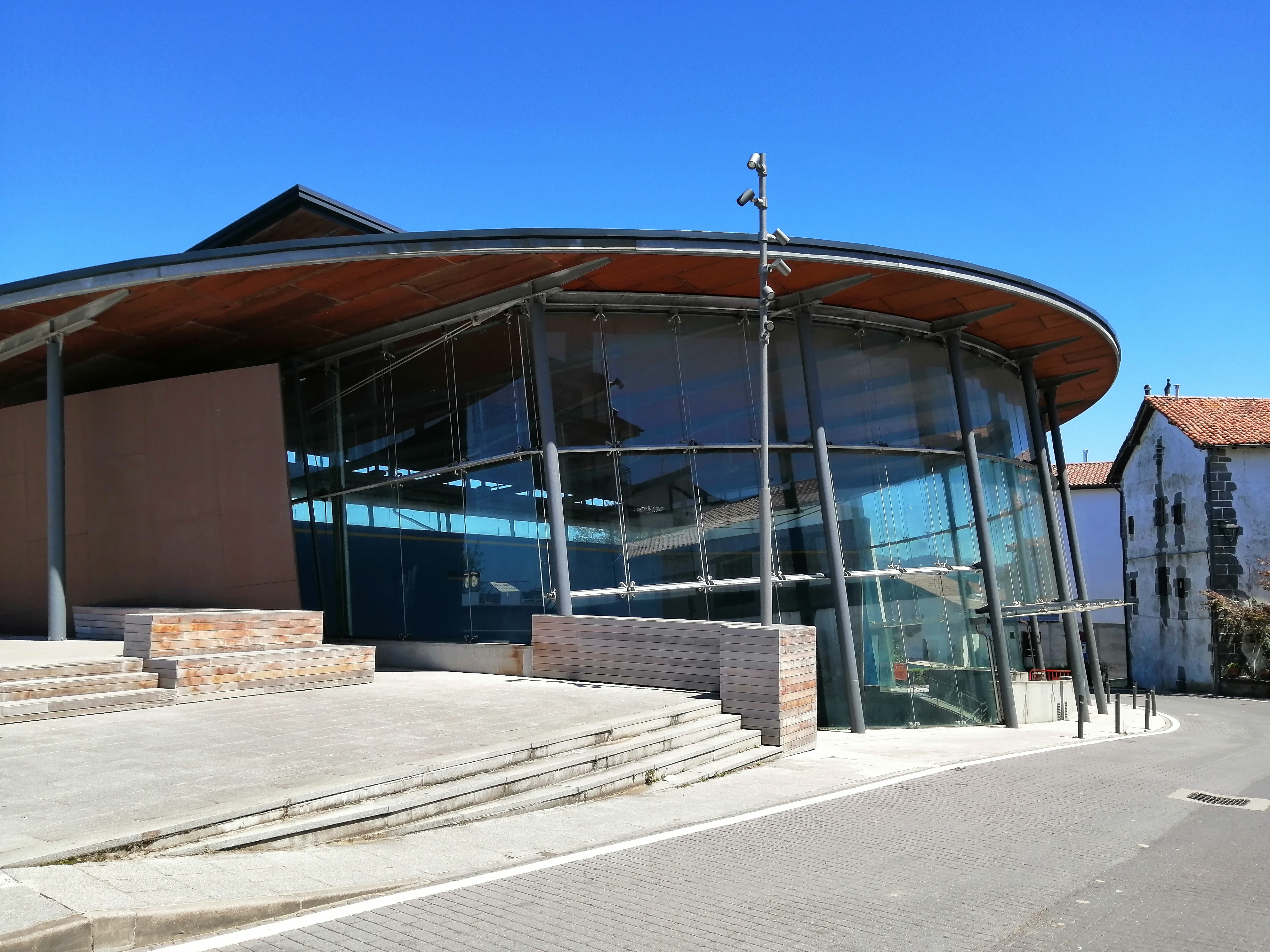 Aiako frontoia